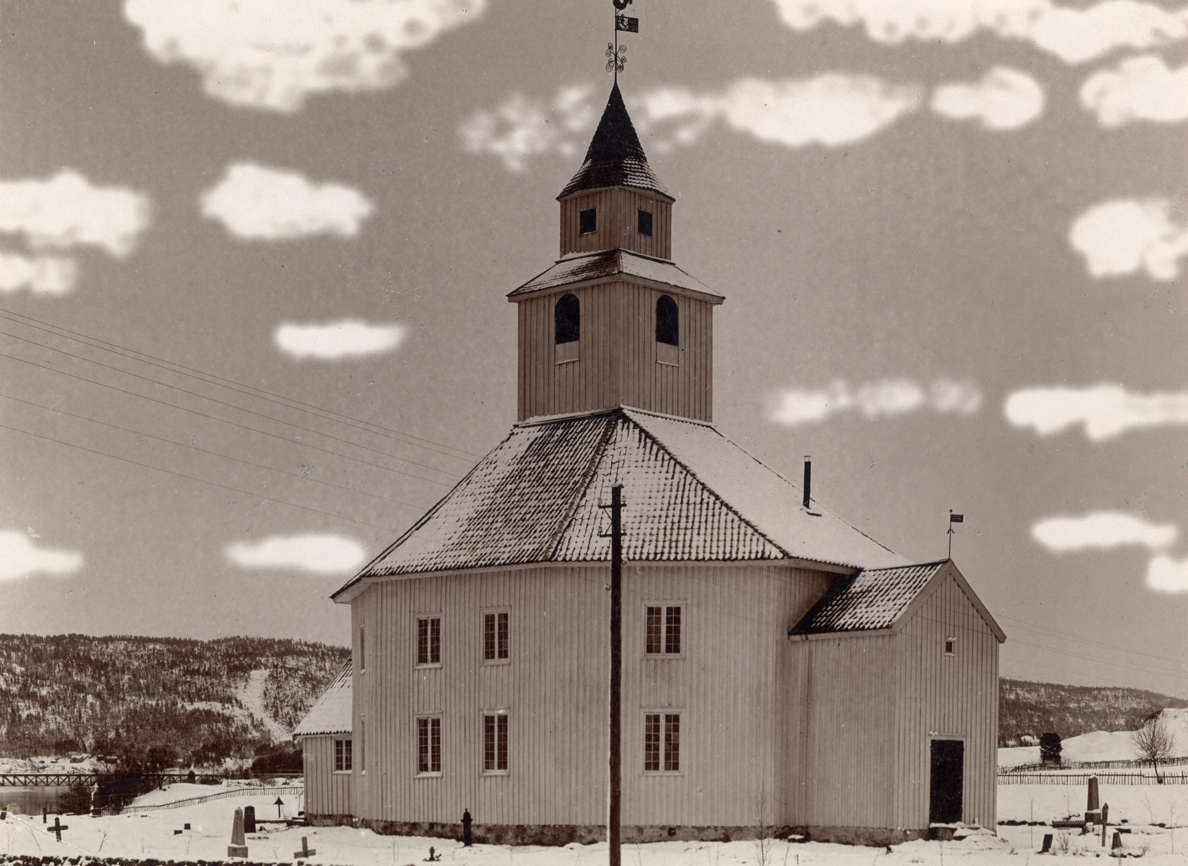 Hornnes kirke, Hornnes kyrkje i Evje og Hornnes, Aust-Agder